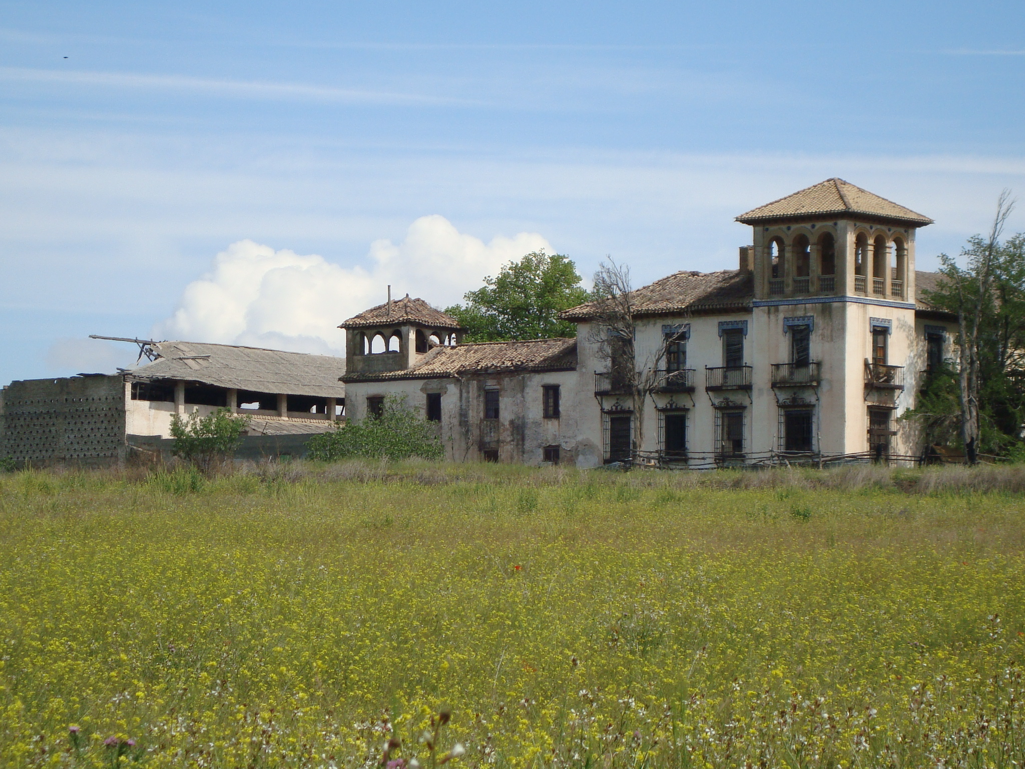 El Cortijo de Los Cipreses en un lamentable estado de abandono y los terrenos del PN-3 próximo objeto de la especulación urbana granadina.